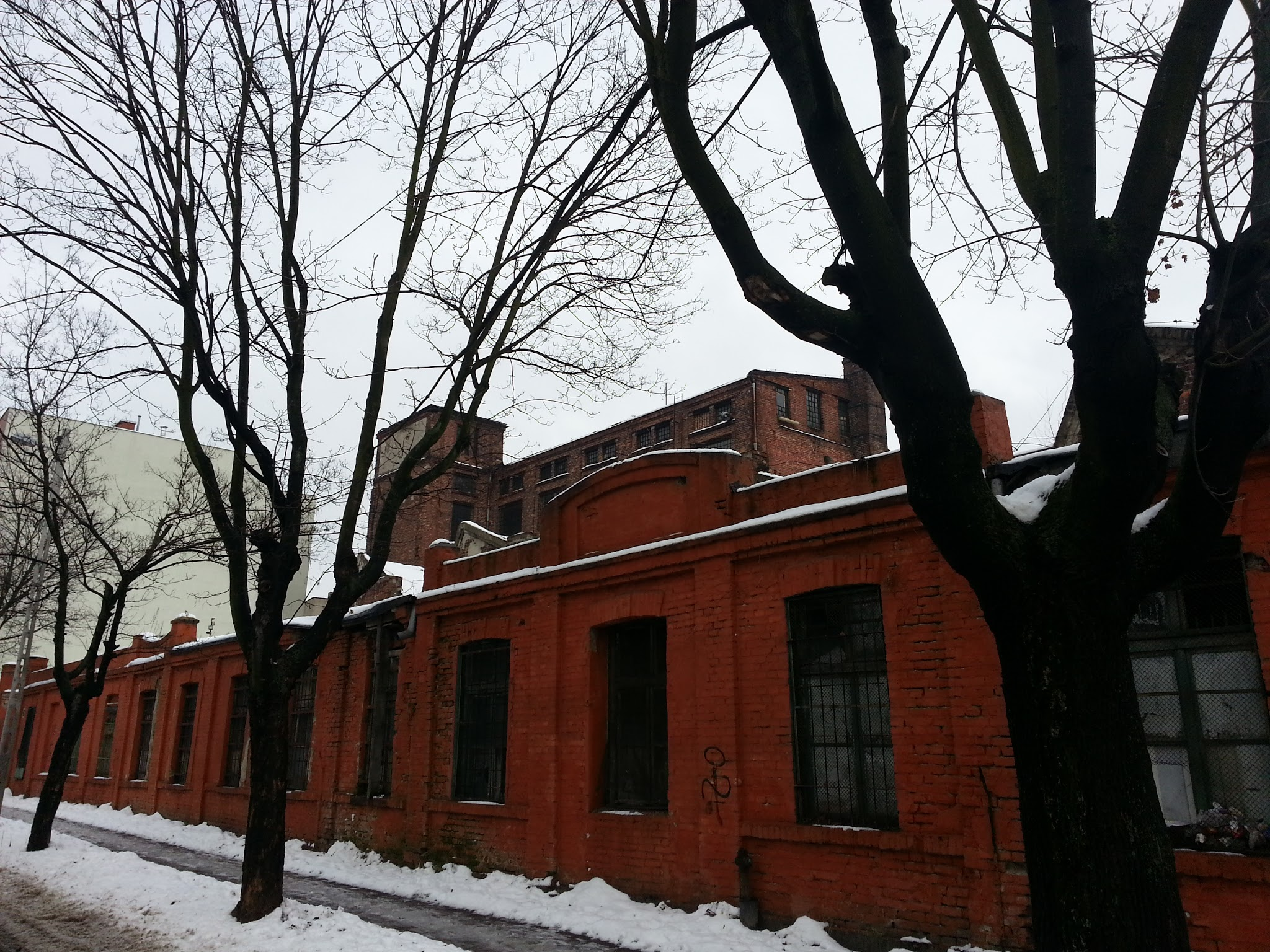 ul. Łomżyńska 8/12, Łódź